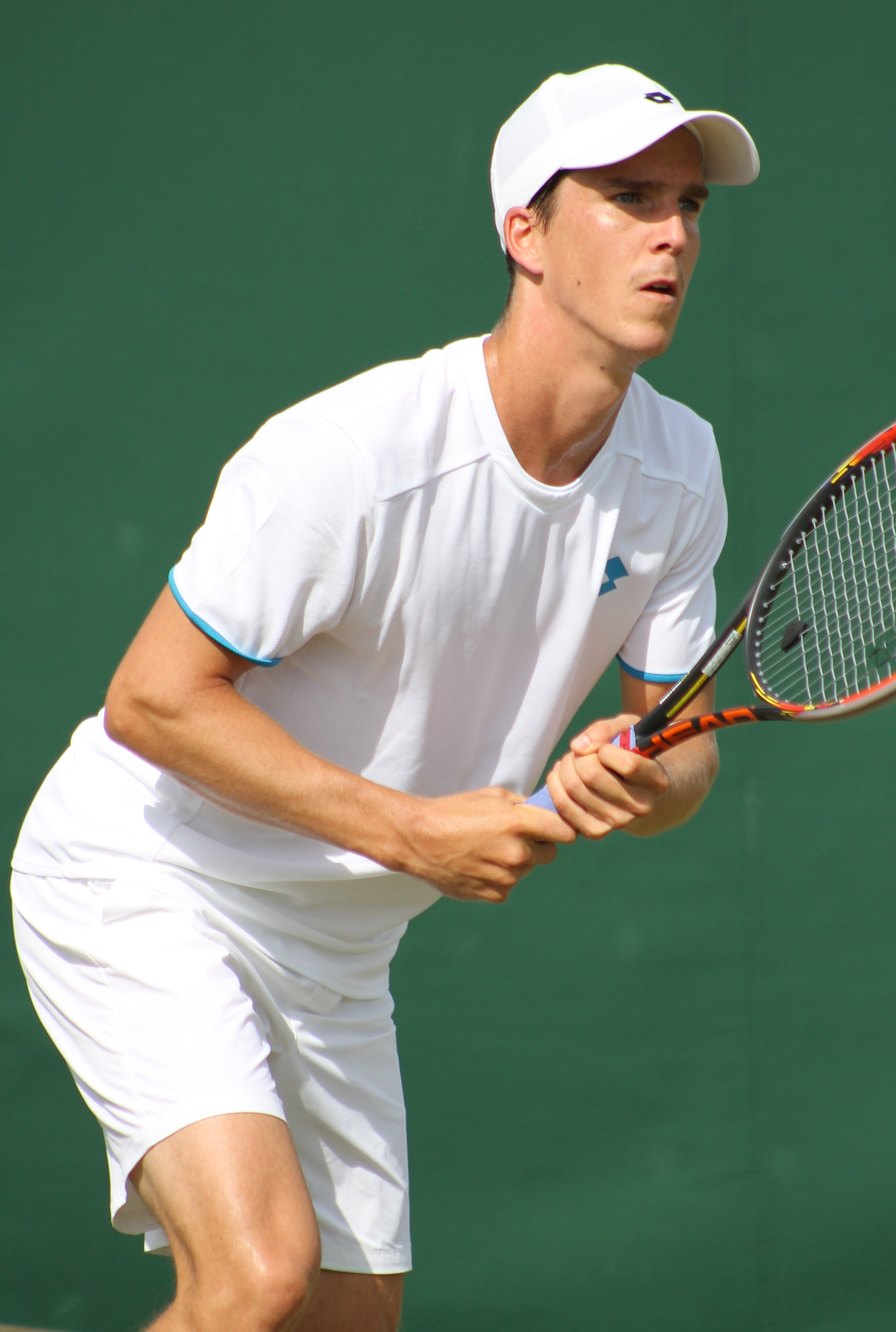 Fischer WMQ14 (20)